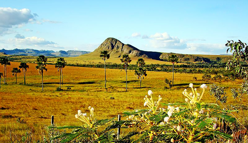 Jardim de Maytrea. Chapada dos Veadeiros-GO